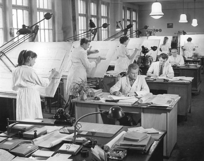 Ingenieure an Reissbrettern Zentralbild Haundorf I-c. 21.1.60 Stahlflaschen vom VEB Feuerlöschgerätewerk Apolda zur Messe Zur Leipziger Frühjahrsmesse 1960 werden in der DDR erstmalig Stahlflaschen (nahtlose Druckgasbehälter) in allen Größen aus der eigenen Produktion des VEB Feuerlöschgerätewerk Apolda ausgestellt. Bisher wurden diese Stahlflaschen aus Westdeutschland eingeführt. Jetzt ist die DDR nicht mehr von den Lieferungen abhängig, sondern exportiert sie selbst. UBz: Blick in das Konstruktionsbüro des VEB Feuerlöschgerätewerk Apolda.